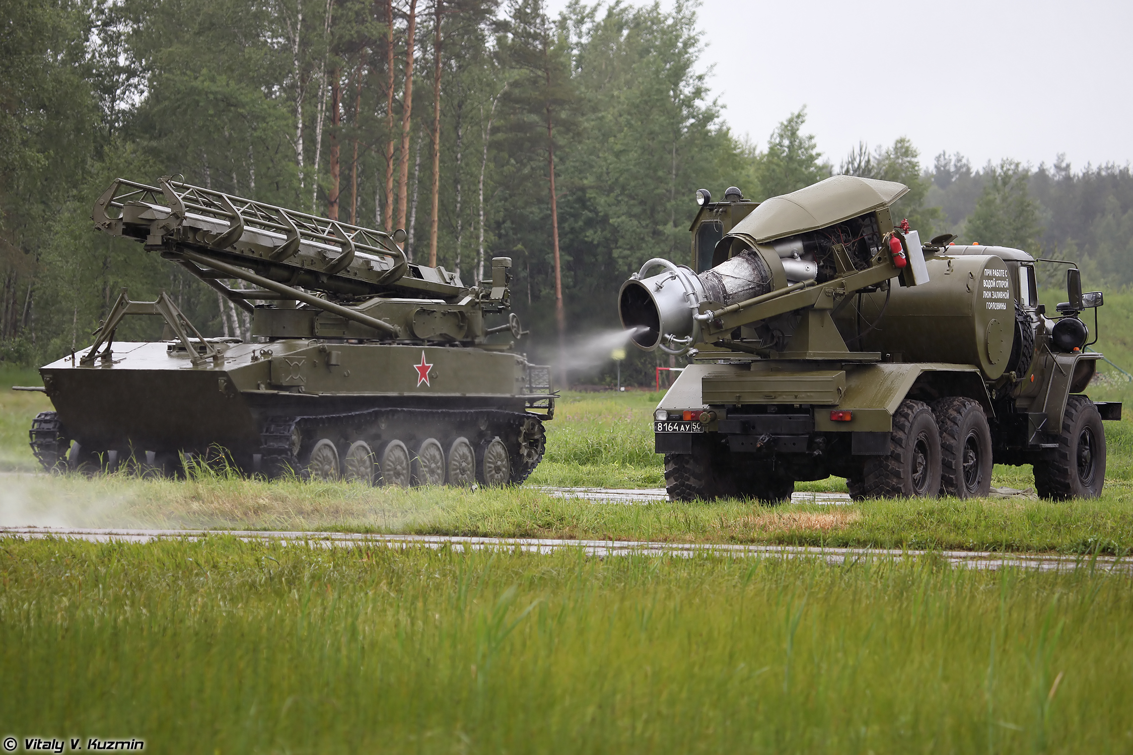 Подготовка тепловой машины ТМС-65У для проведения специальной обработки РХМ-4 (Preparation of TMS-65U vehicle for decontamination of RKhM-4)